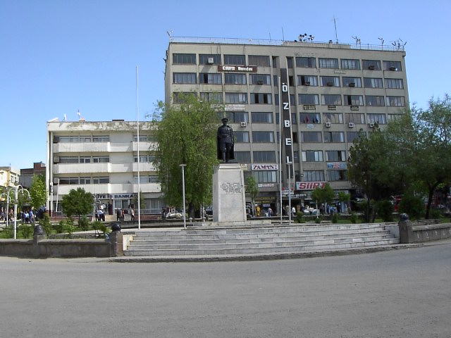 Şehir Merkezi